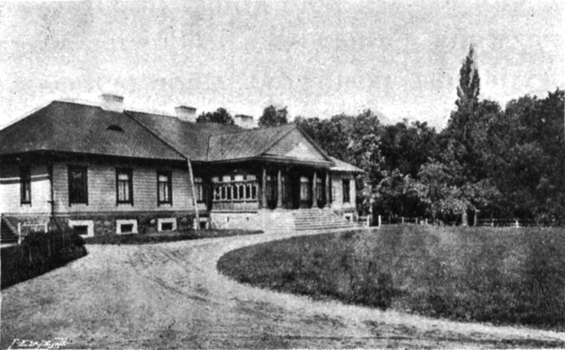 Беларуская (тарашкевіца): Маліноўшчына (Malinoŭščyna), сядзіба Сьвентажэцкіх (Śvientažecki)